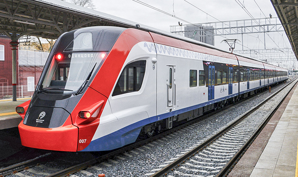 Электропоезд ЭГ2Тв-007 на Белорусском вокзале в Москве